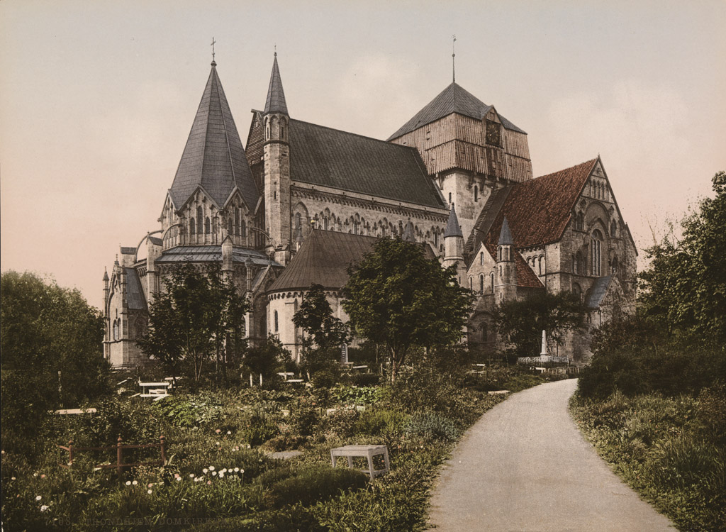 Tittel / Title: 7108. Trondhjem Domkirken Dato / Date: ca 1890-1900 Fotograf / Photographer: ukjent / unknown Sted / Place: Sør-Trøndelag, Trondheim, Nidarosdomen Eier / Owner Institution: Nasjonalbiblioteket / National Library of Norway Lenke / Link: Bildesignatur / Image Number: bldsa_FA0687